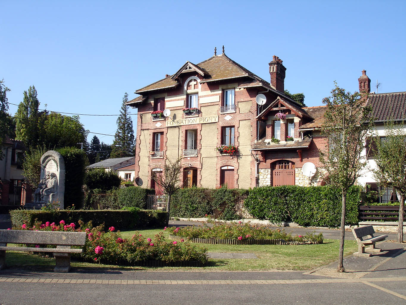 La fondation Pigny à Montlignon (Val-d'Oise), France